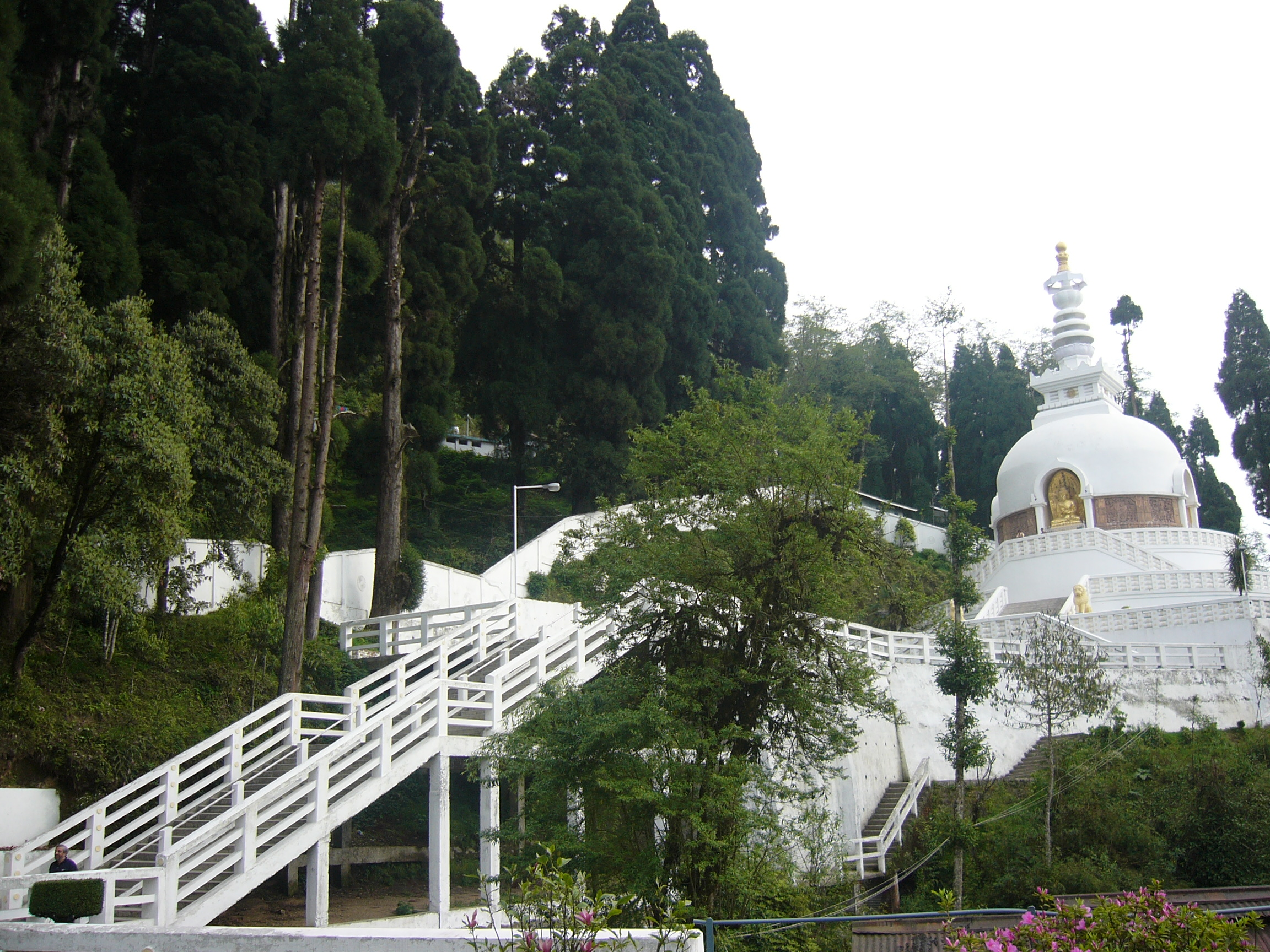 Buddhist Temple Peace Pagoda Darjeeling West Bengal India